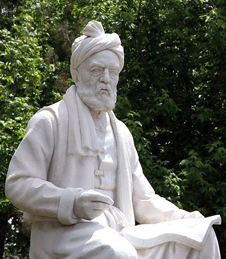 تندیس فردوسی در آرامگاه فردوسی در توس، ایران. سال نصب تندیس: ۱۳۴۸ شمسی. با فرض اینکه تندیس در مالکیت شخص حقوقی بوده، ۳۰ سال از رونمایی آن گذشته و در حال حاضر در مالکیت عمومی است. در نتیجه عکس گرفتن از آن فاقد اشکال است.